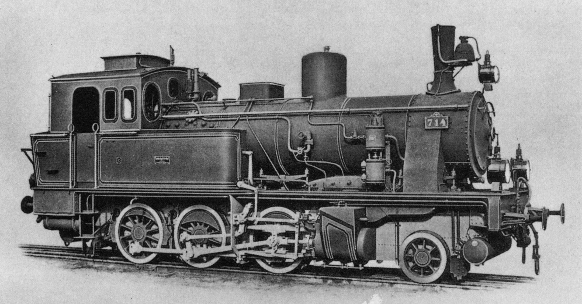 Dampflokomotive Mecklenburgische XXI.